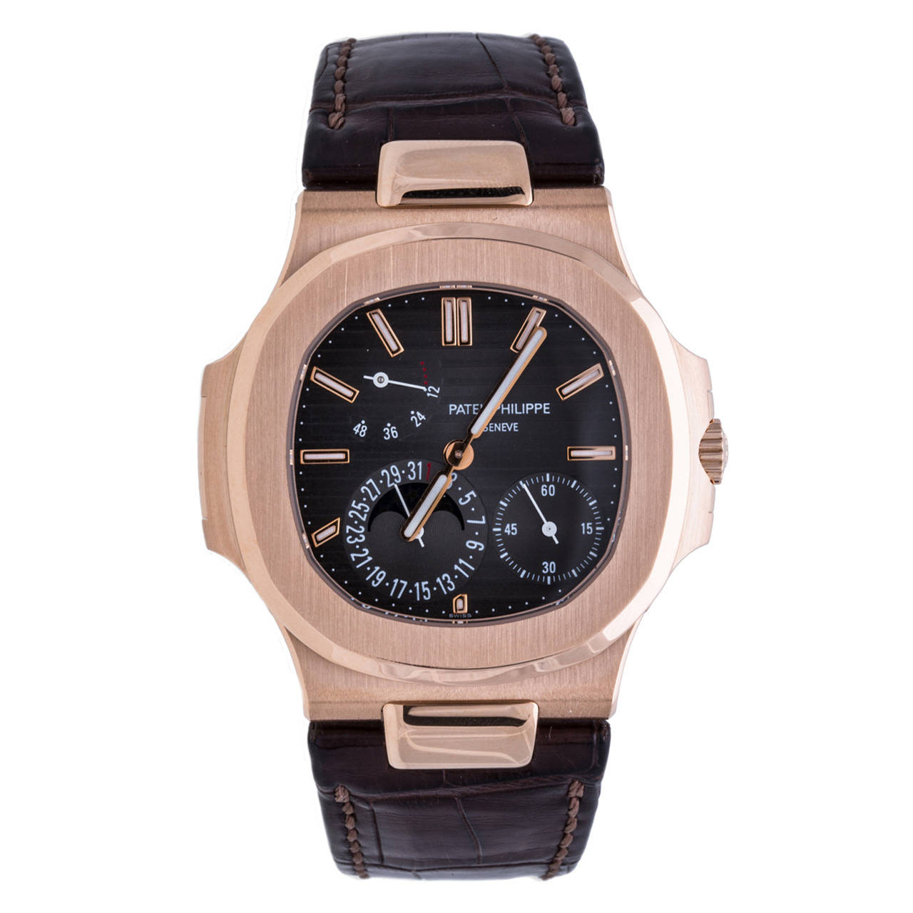 Ref. 5712R с индикатором запаса хода, календарем-датой, указателем фазы Луны (розовое золото)